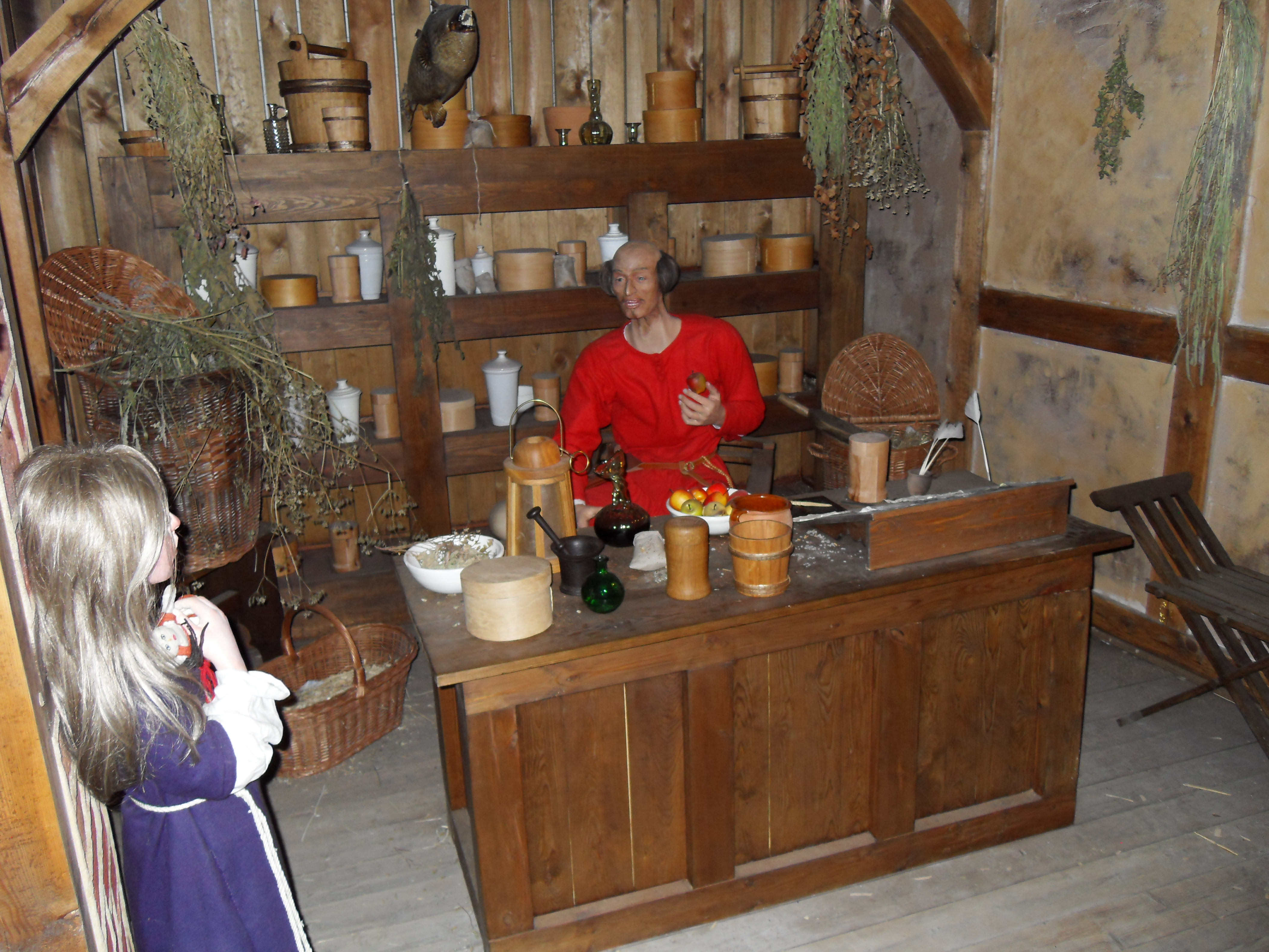 Gdańsk, Wyspa Spichrzów. Ul. Chmielna, spichlerz Błękitny Baranek - inscenizacja.